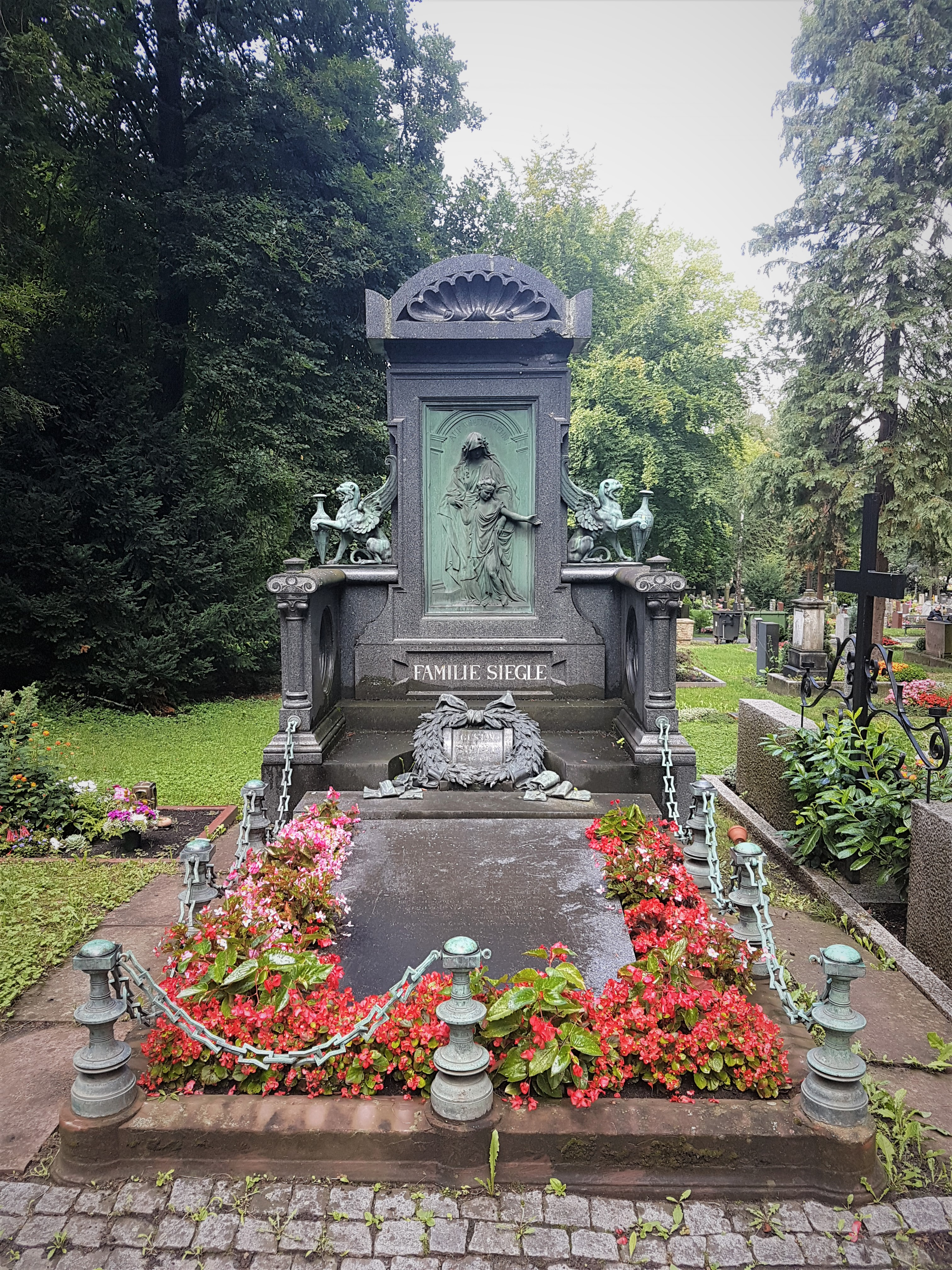 Grabmal des Industriellen Gustav Siegle und seiner Familie auf dem Fangelsbachfriedhof in Stuttgart